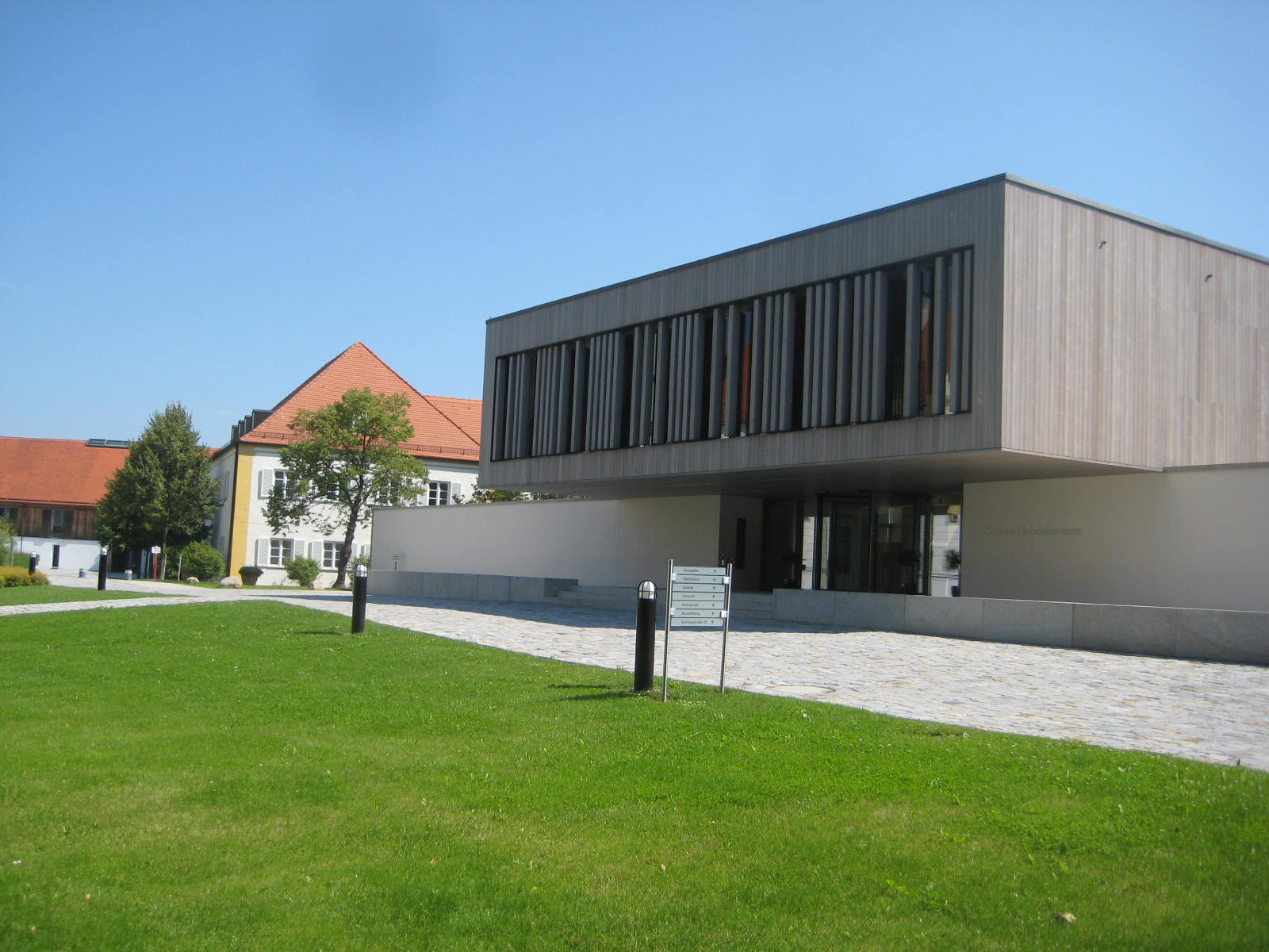 Neubau eines Vorlesungs- und Seminargebäudes am Wasserschloss Hohenkammer.